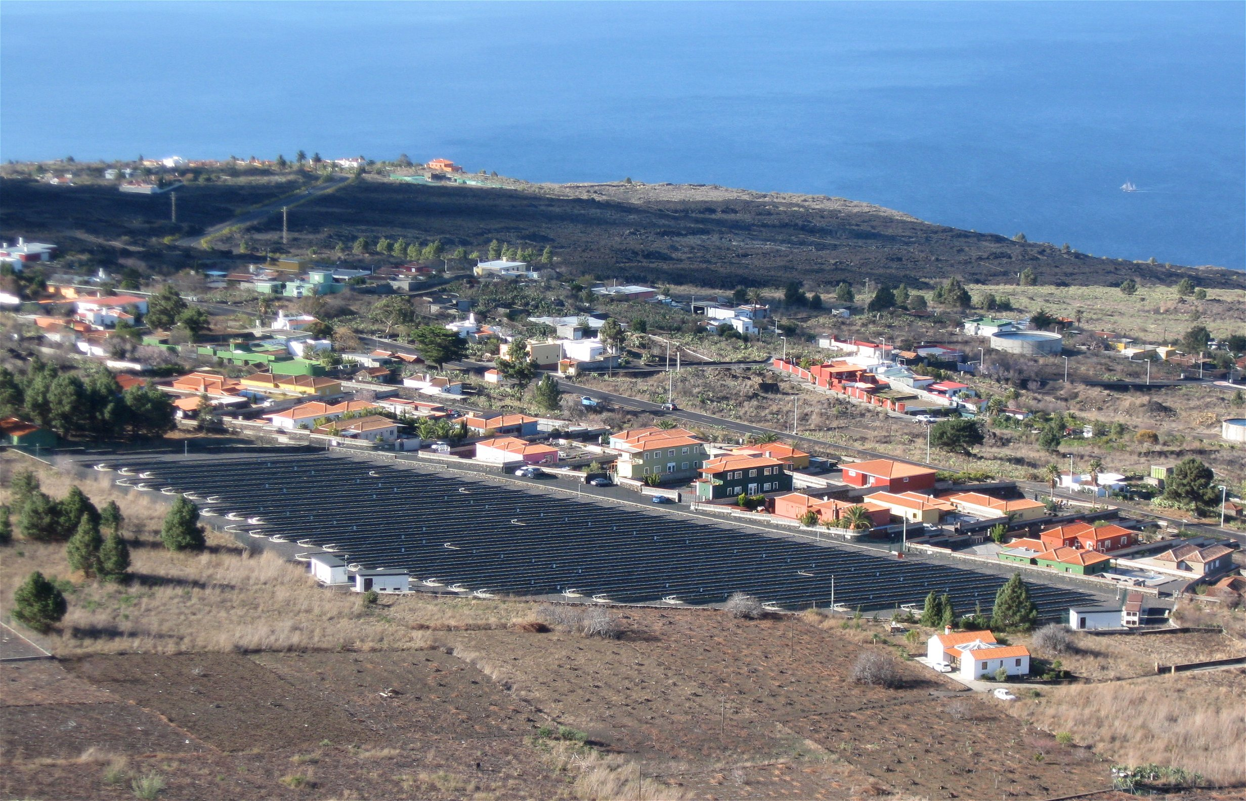 Photovoltaikanlage, El Paso, La Palma